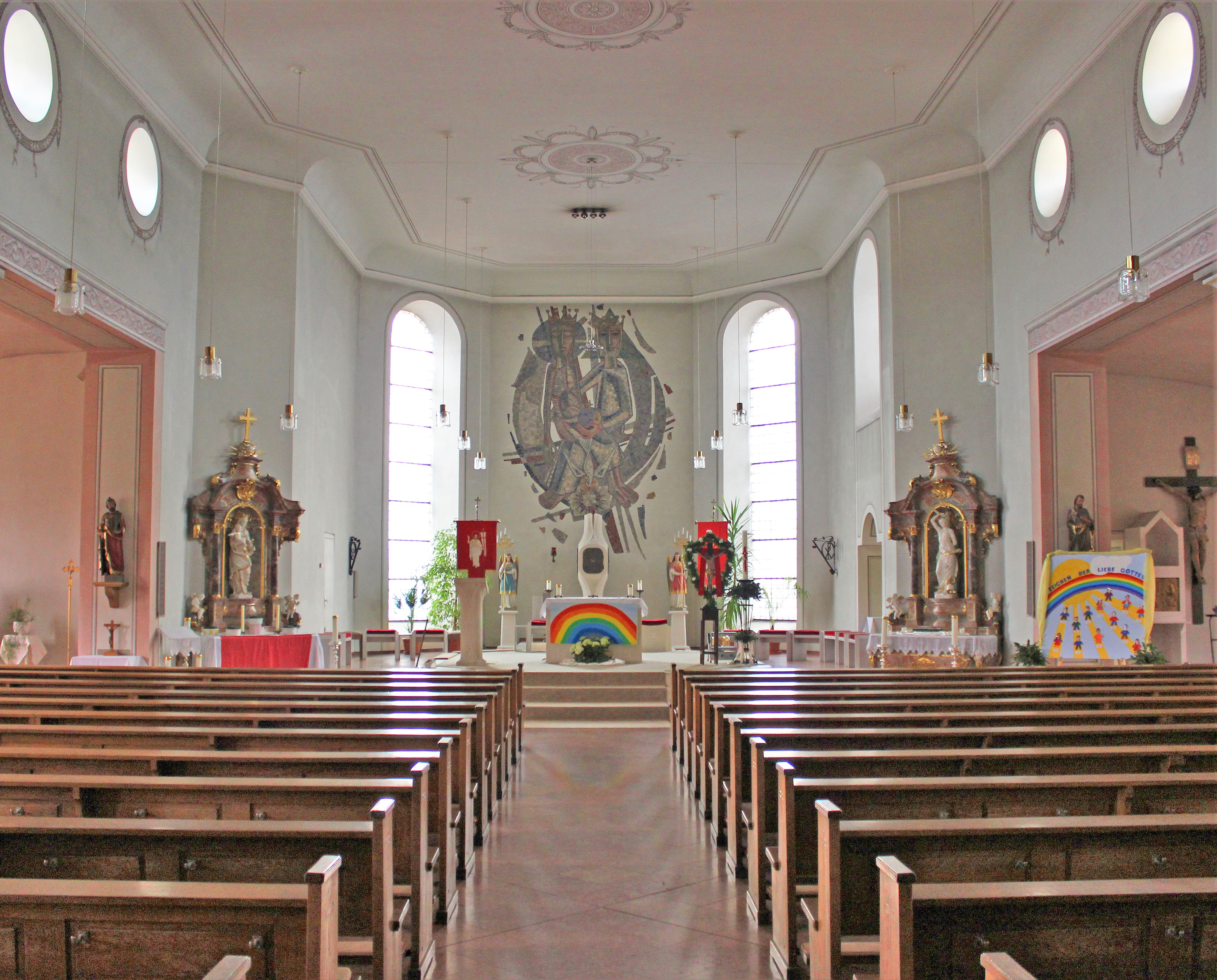 Blick ins Innere der katholischen Pfarrkirche St. Mauritius (erbaut 1829-1831) in Alsweiler, einem Ortsteil der Gemeinde Marpingen, Landkreis St. Wendel, Saarland